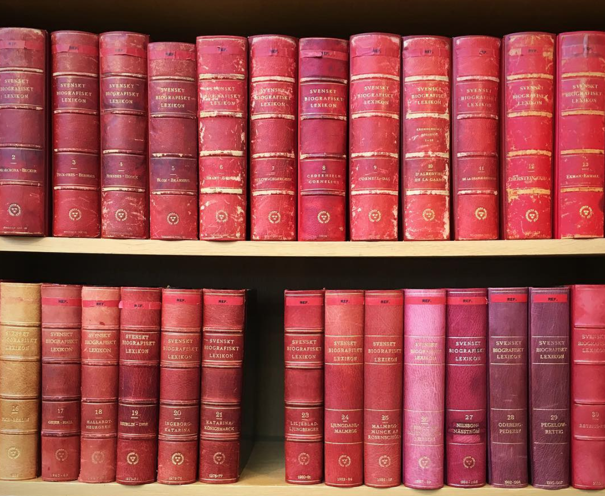 Hyllan med SBL på Riksarkivet